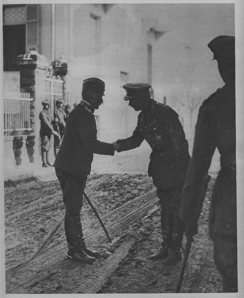 le général anglais George Milne remettant la GCMG au général serbe Michitch, le Miroir N°173.